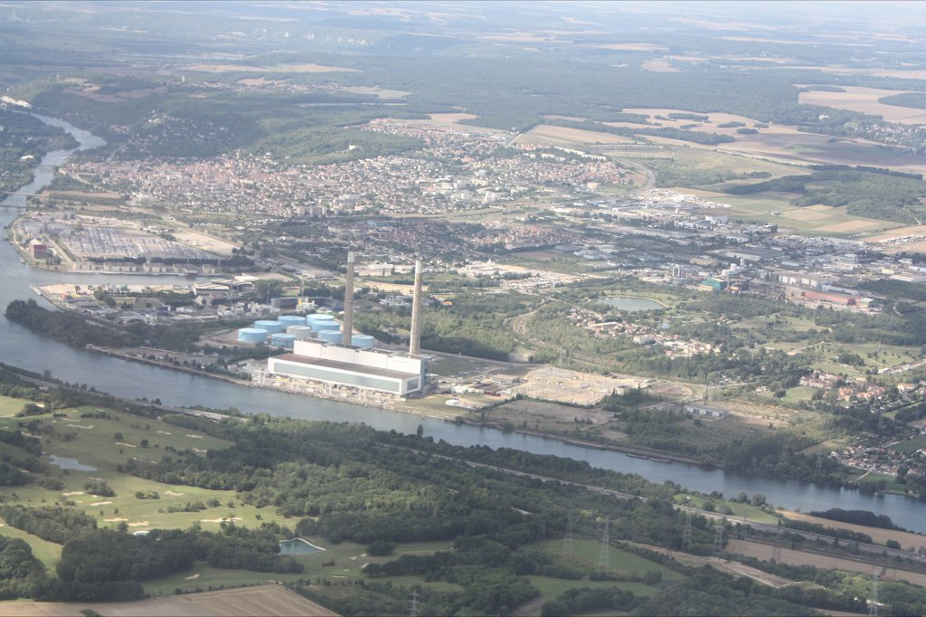 Centrale thermique de Porcheville